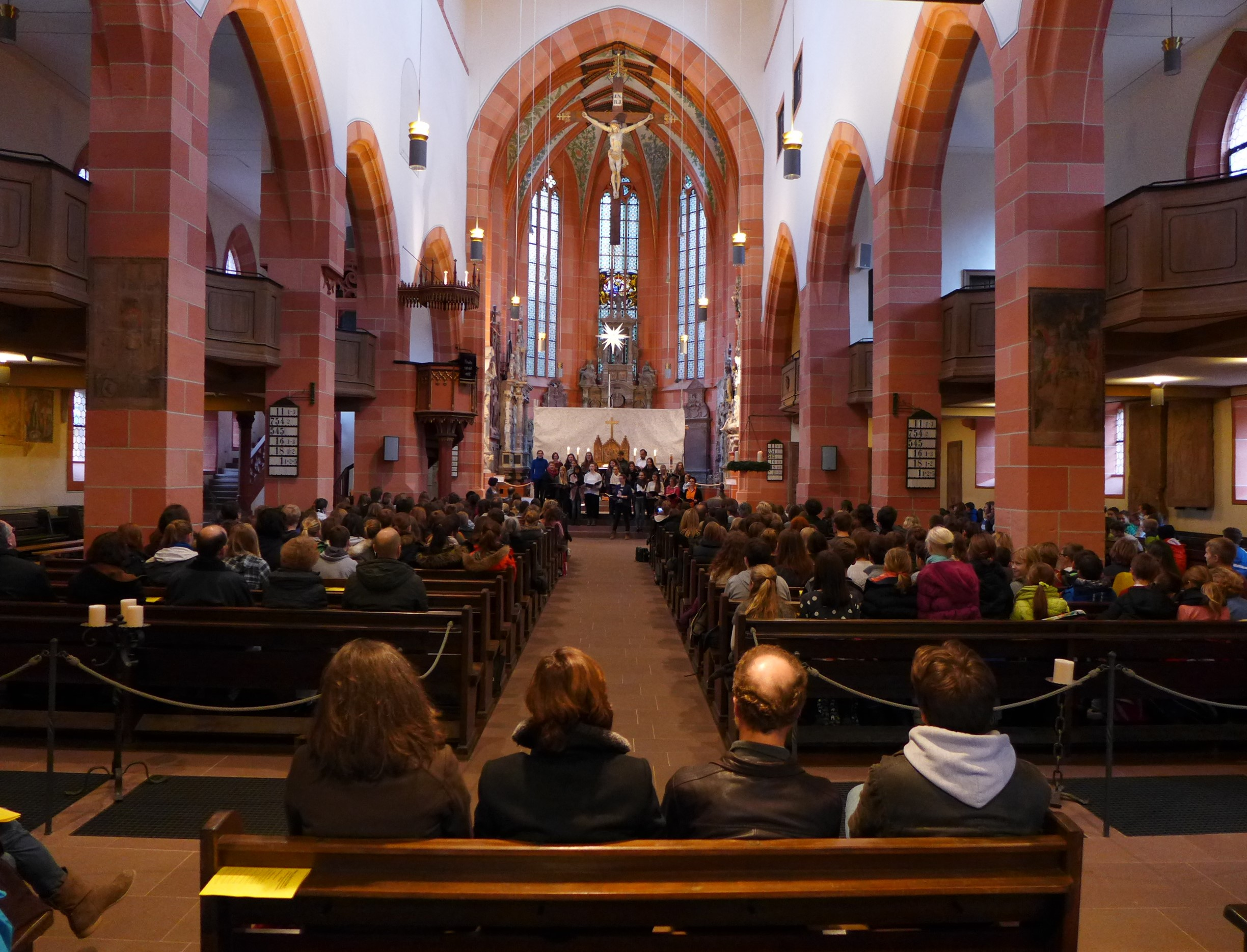 Wertheim, Inneres der Stiftskirche, Blick zur Apsis